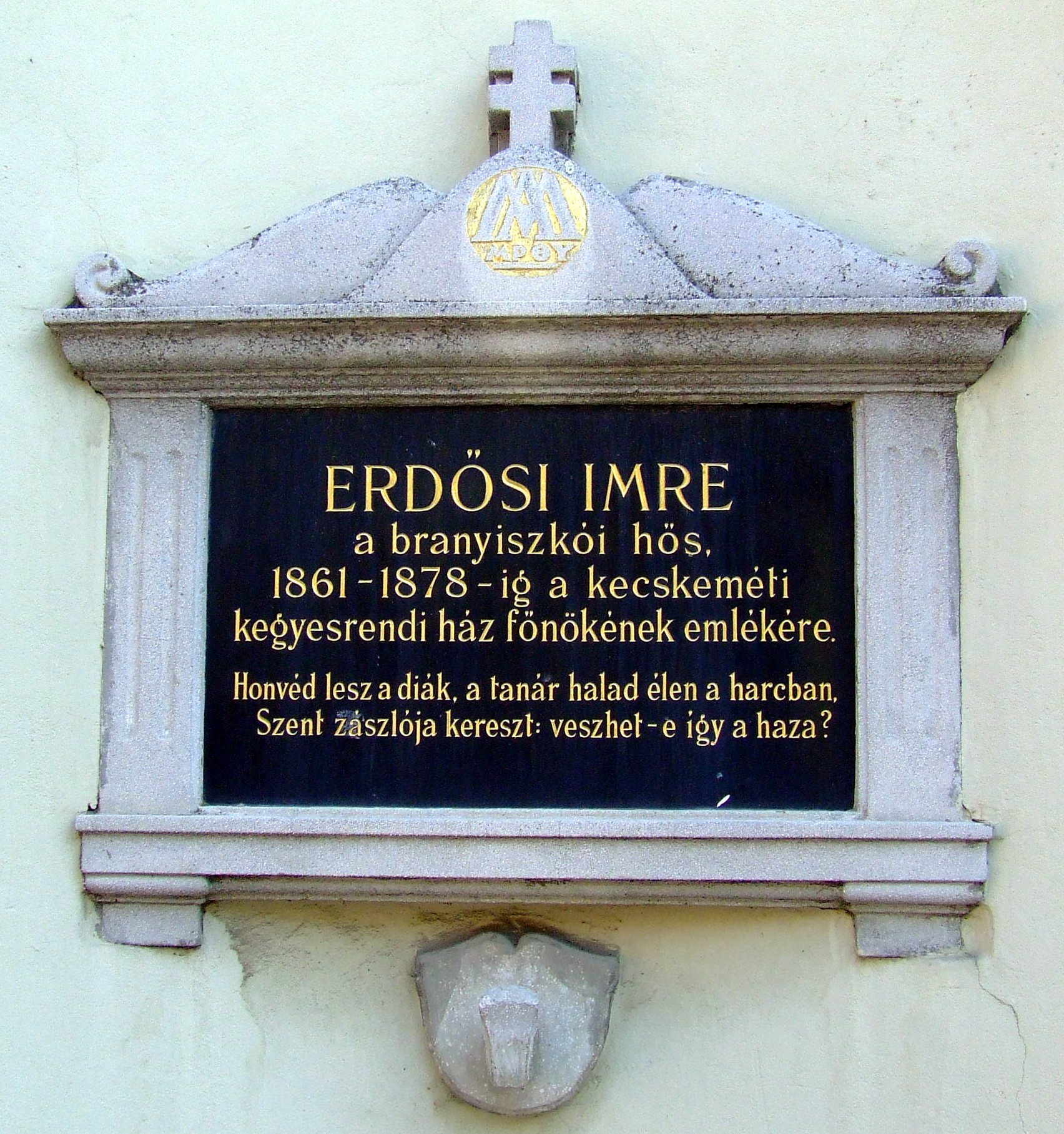 Erdősi Imre-emléktábla Kecskeméten